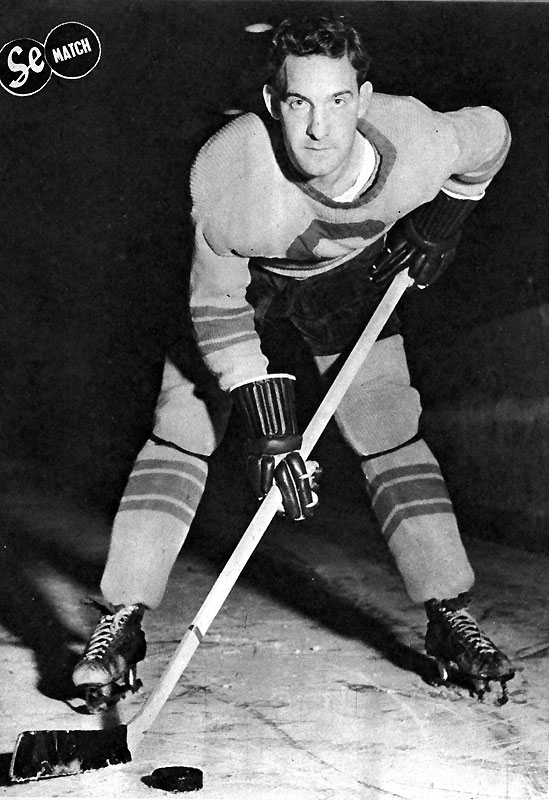 Folke Jansson